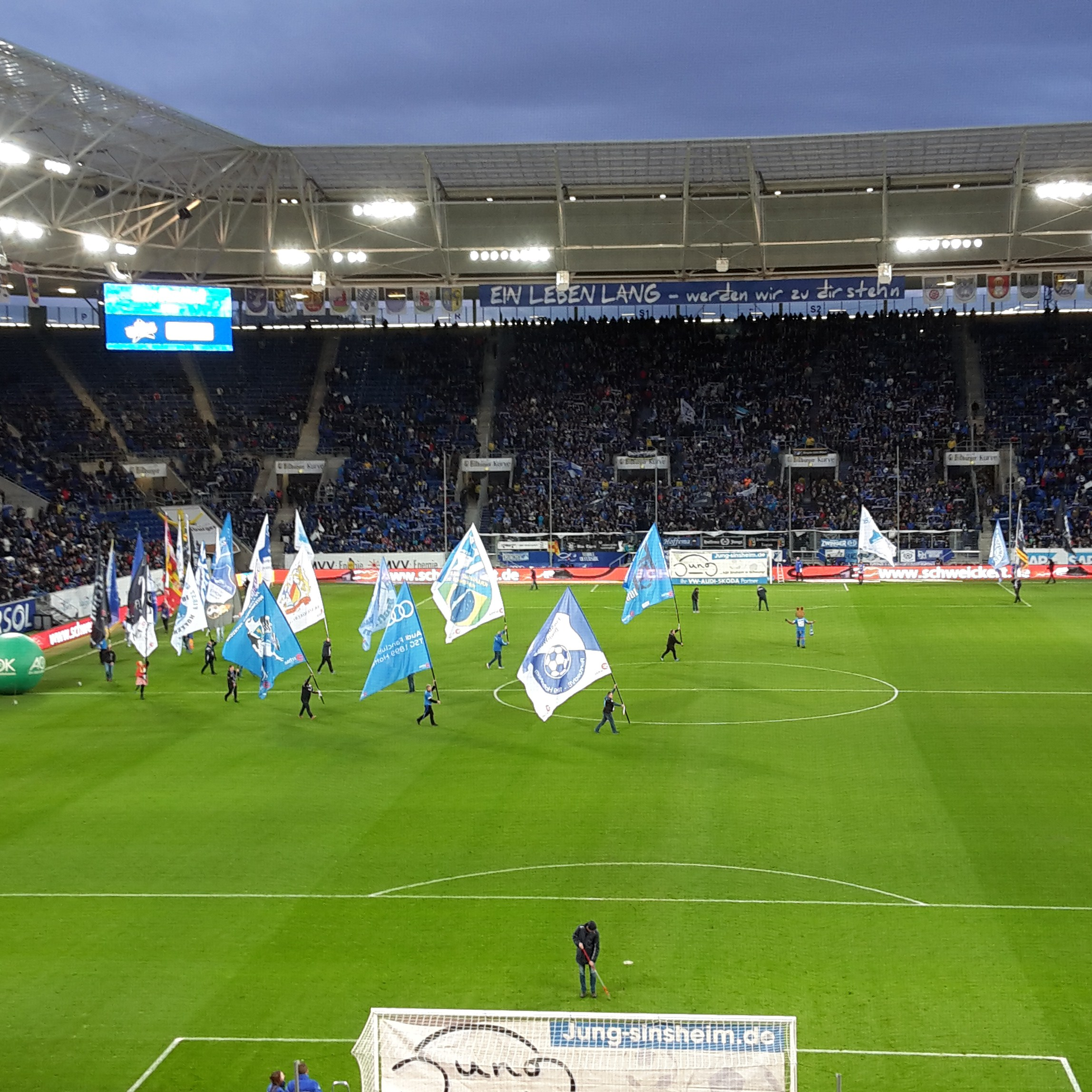 Avant match du TSG Hoffenheim 1899.